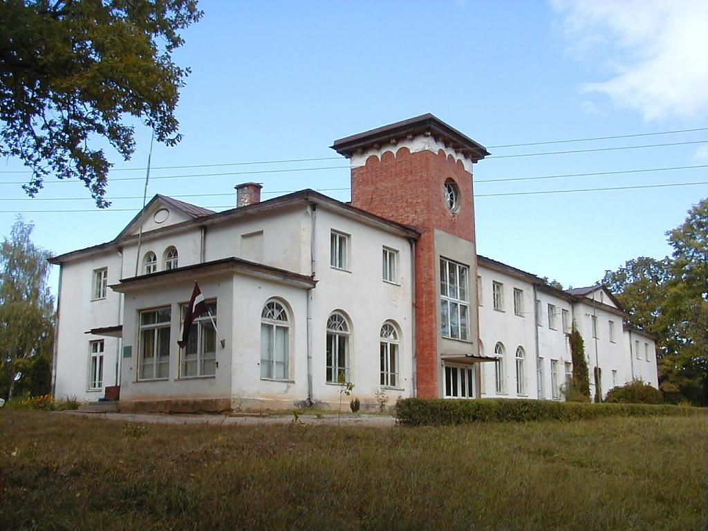 Romeškalna muižas kungu māja 2002-09-13. Bijusī Veclaicenes pamatskola, likvidēta 2009. gadā.